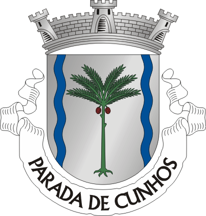 Brasão da freguesia de Parada de Cunhos (concelho de Vila Real)